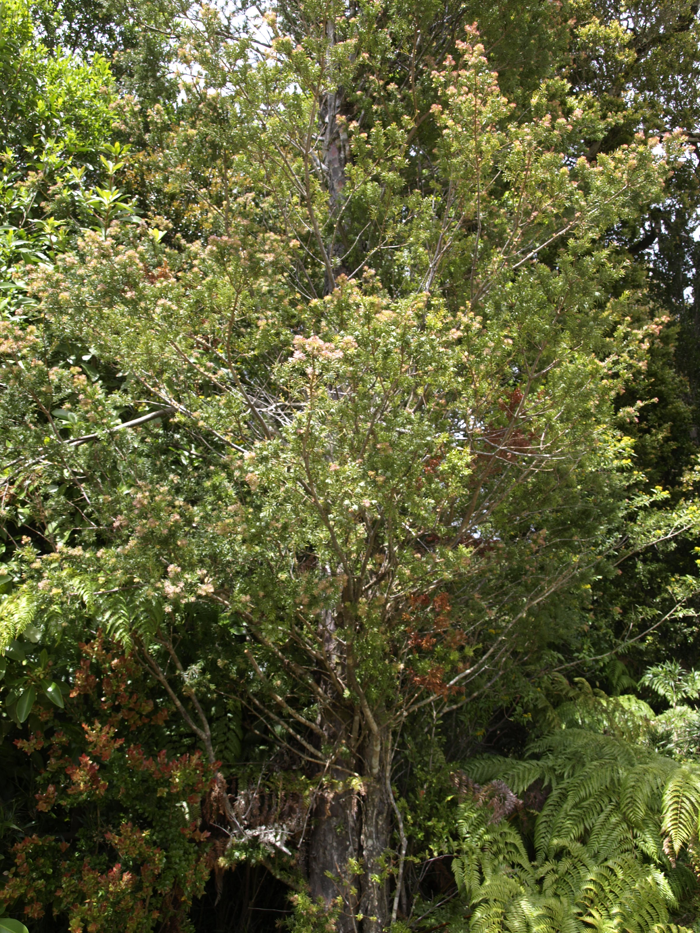 Saxegothaea conspicua, Parque Oncol, Chile.